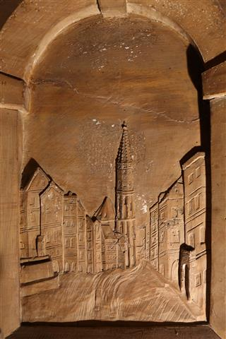 Älteste, stilisierte Abbildung des Neuöttinger Stadtplatzes um 1588, Ausschnitt aus dem Epitaph des Bernhard Bogner in der Stadtpfarrkirche St. Nikolaus, Solnhofener Stein